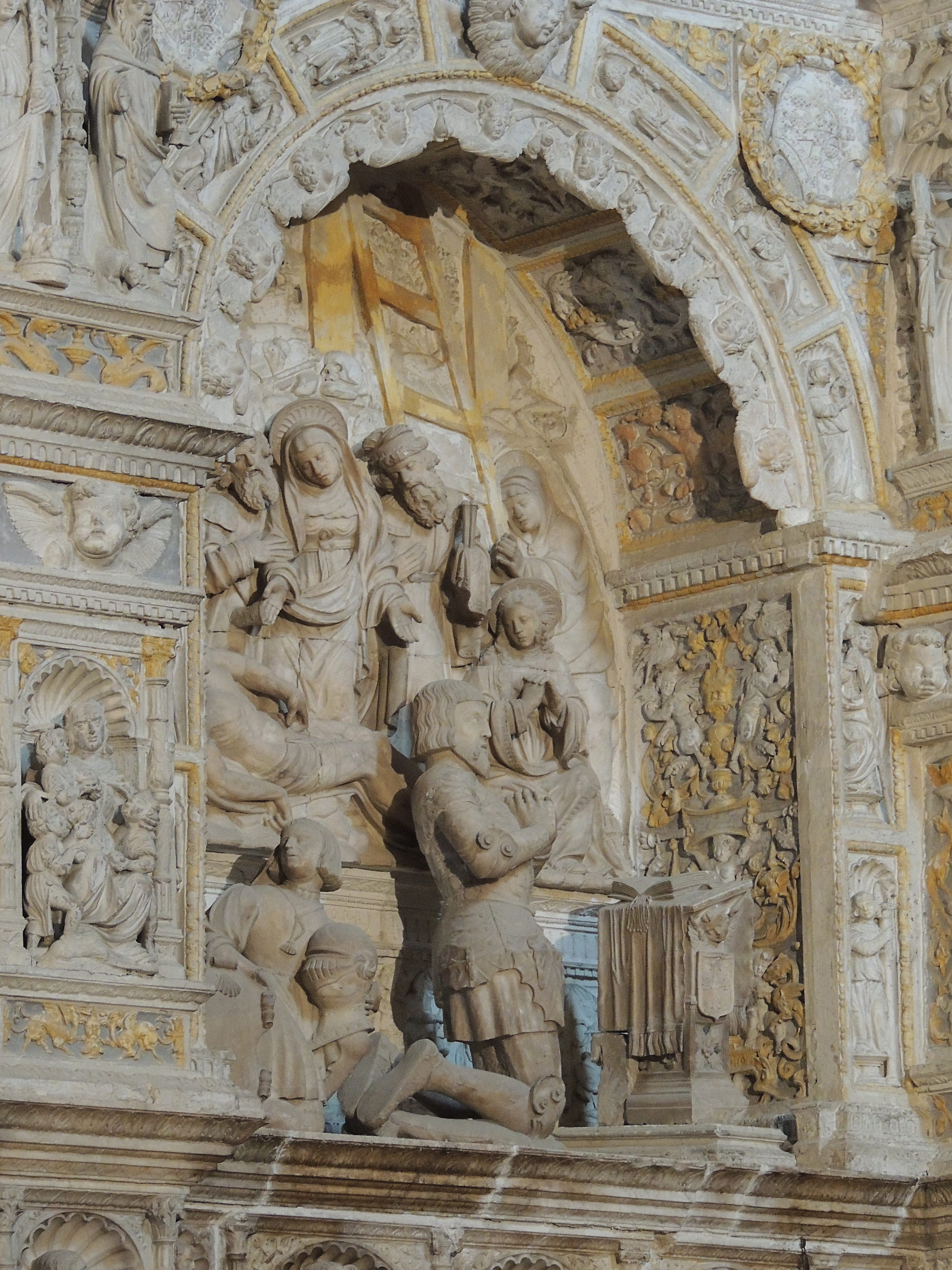 Sepulcro de Juan Pacheco